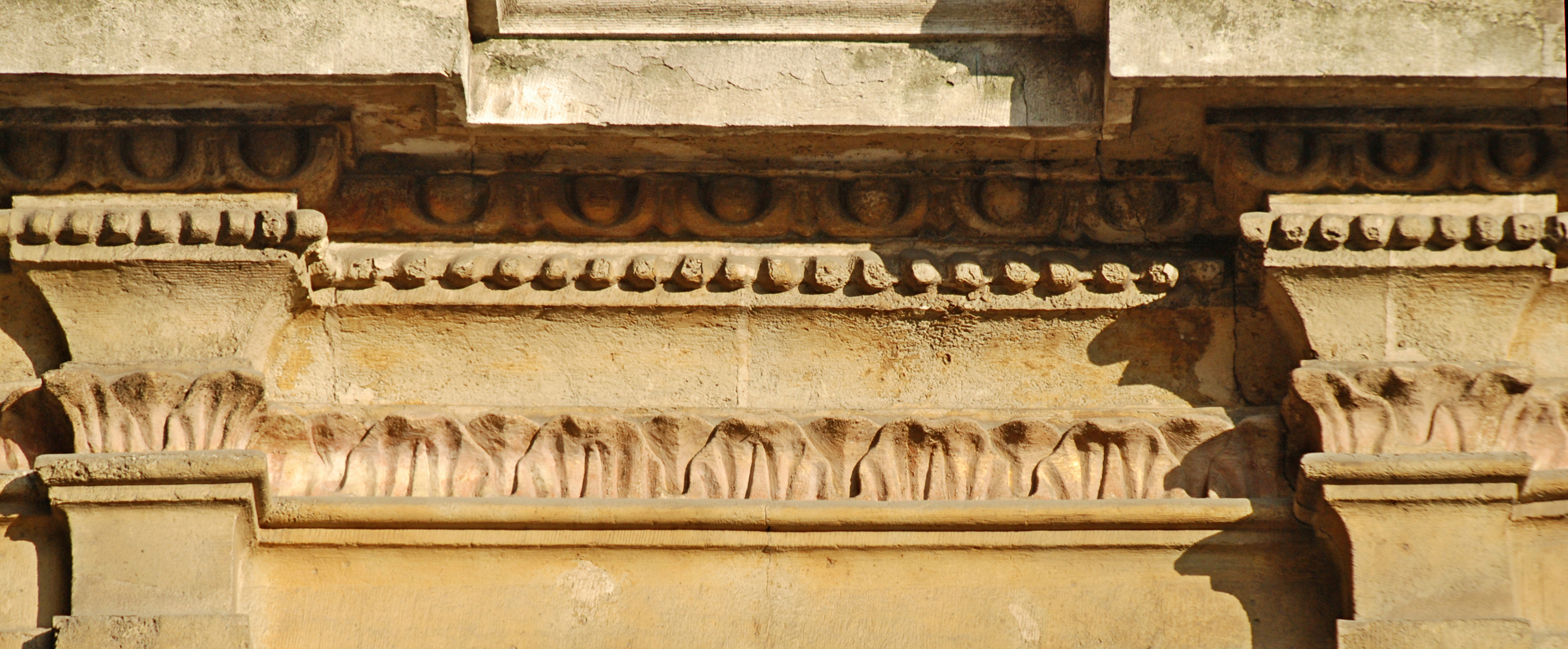 Belgique - Bruxelles - Grand-Place - Maison du Cornet